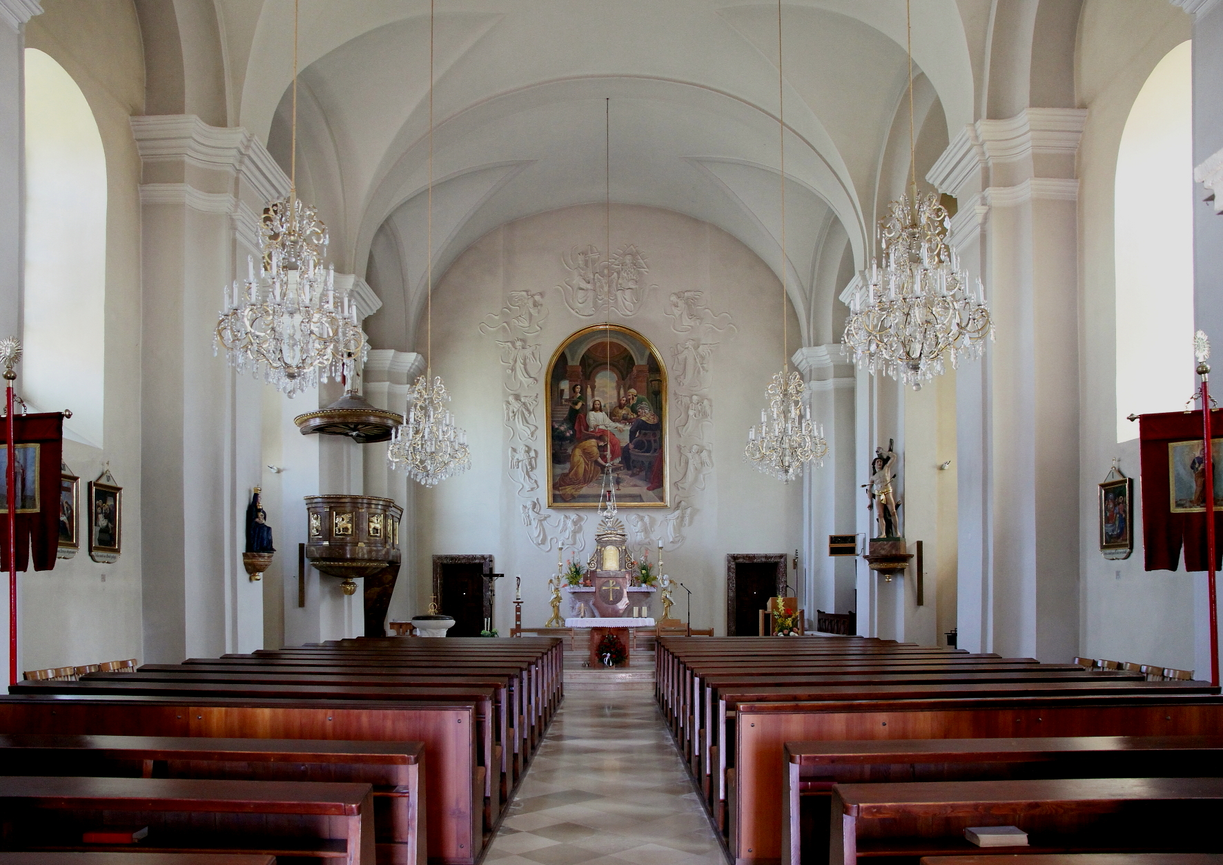 Die Innenansicht der kath. Pfarrkirche hl. Maria Magdalena in der burgenländischen Gemeinde Schützen am Gebirge.